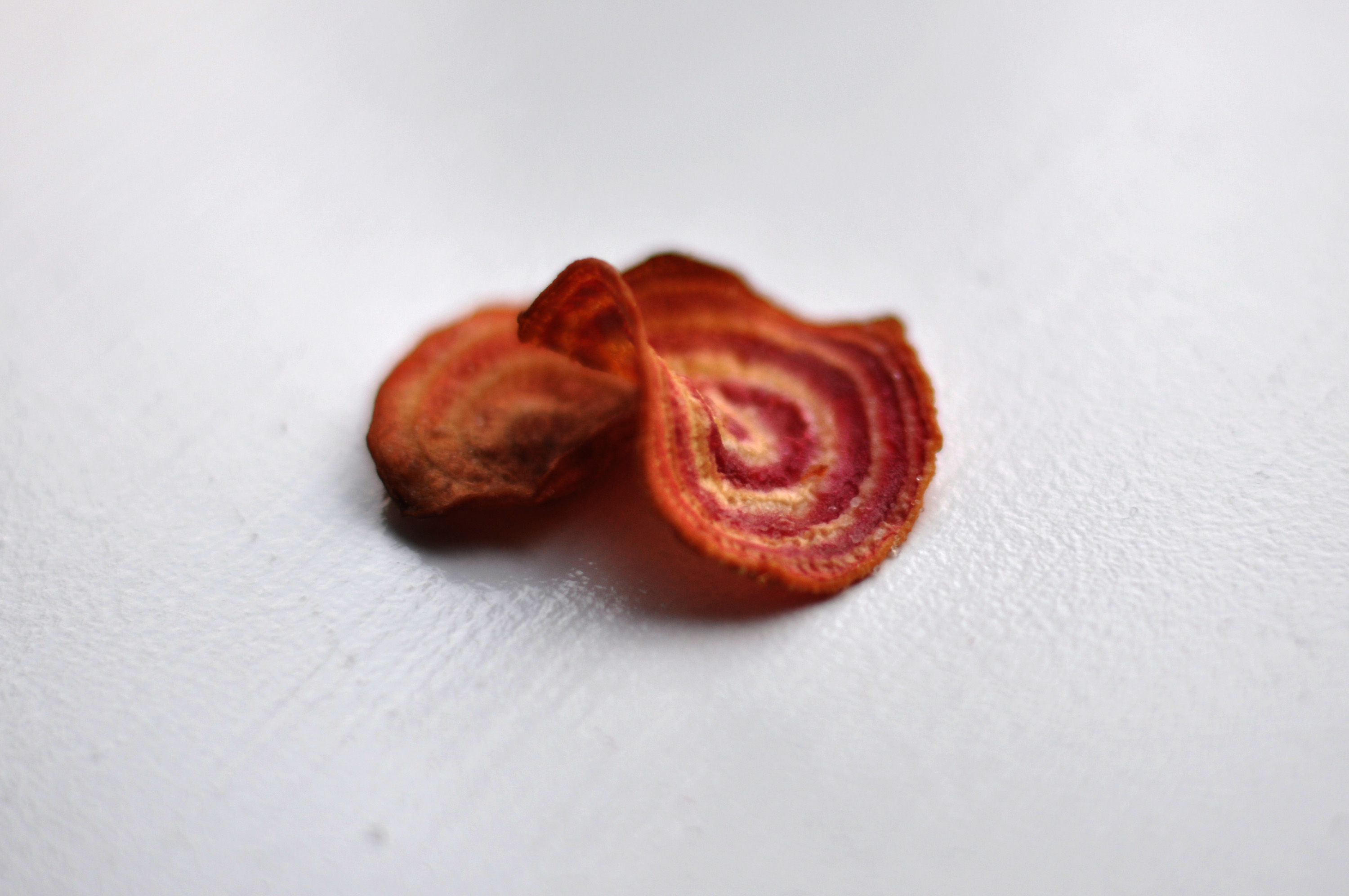 Chips af bolsjebeder